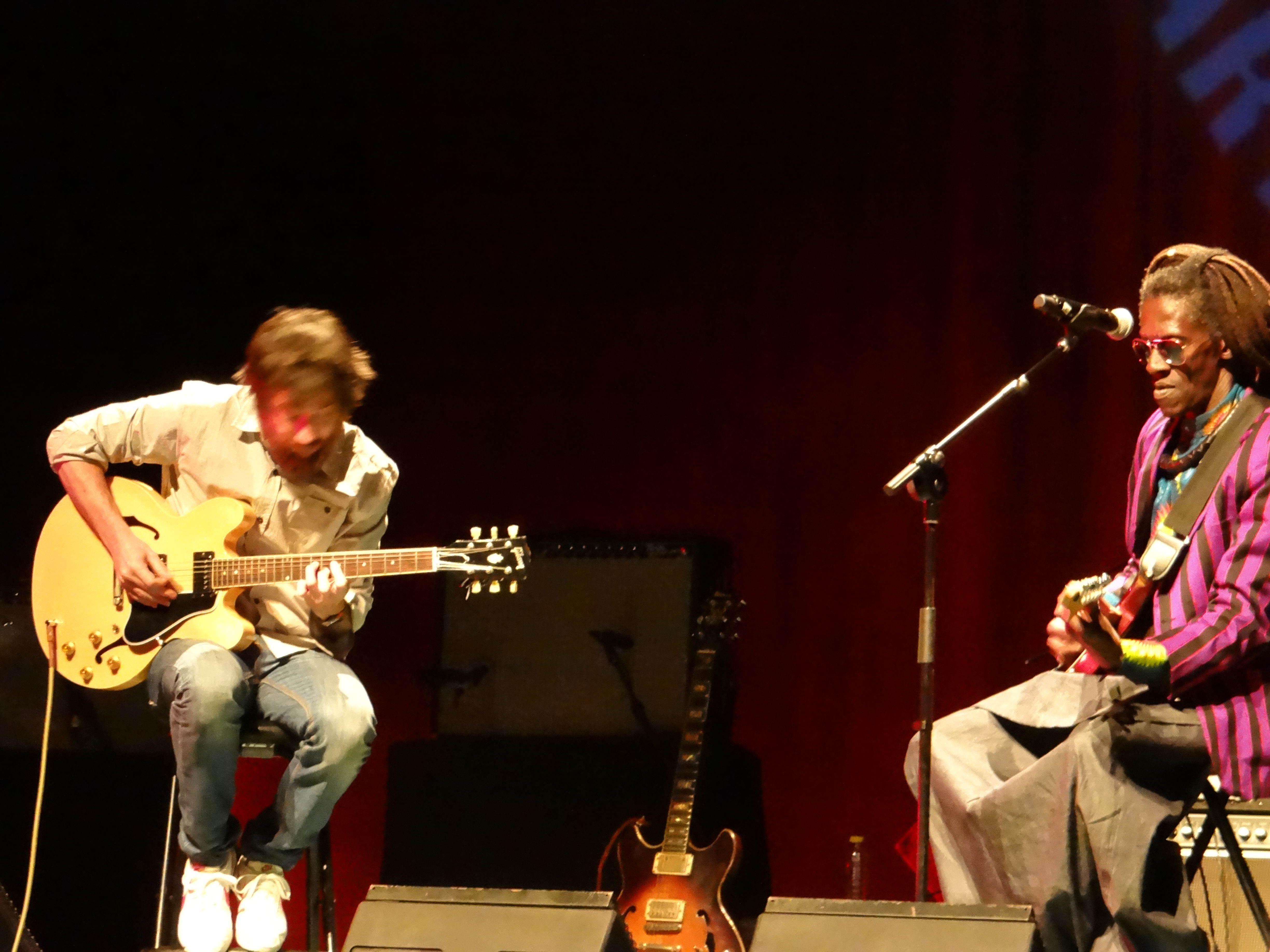 Duo con Raül 'Refree' con Cheikh Lô durante su Concierto en La Mar de Músicas, Cartagena (18 de julio de 2016) Auditorio El Batel